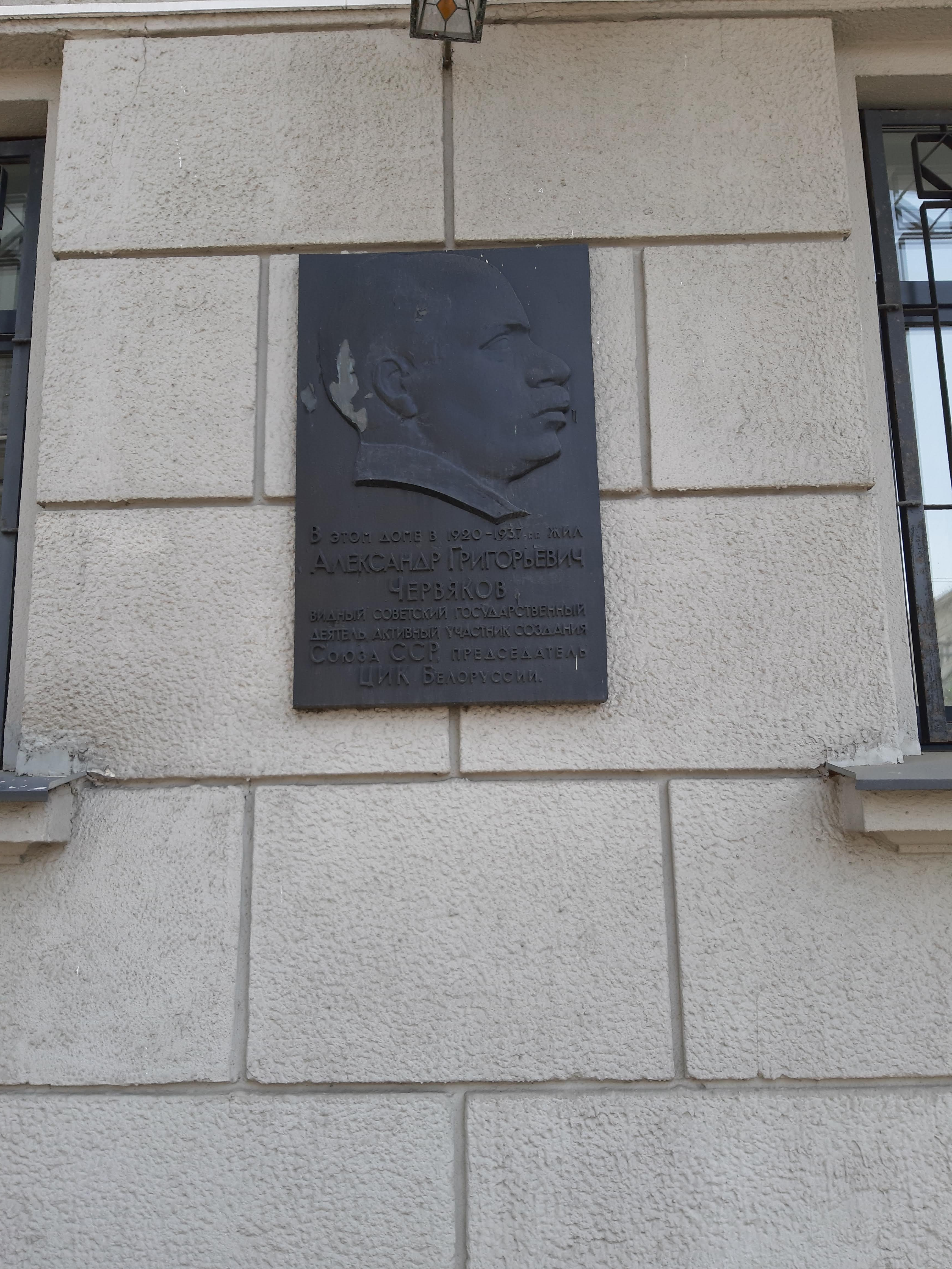 Мінск. Ад пл. Незалежнасці да Залатой Горкі